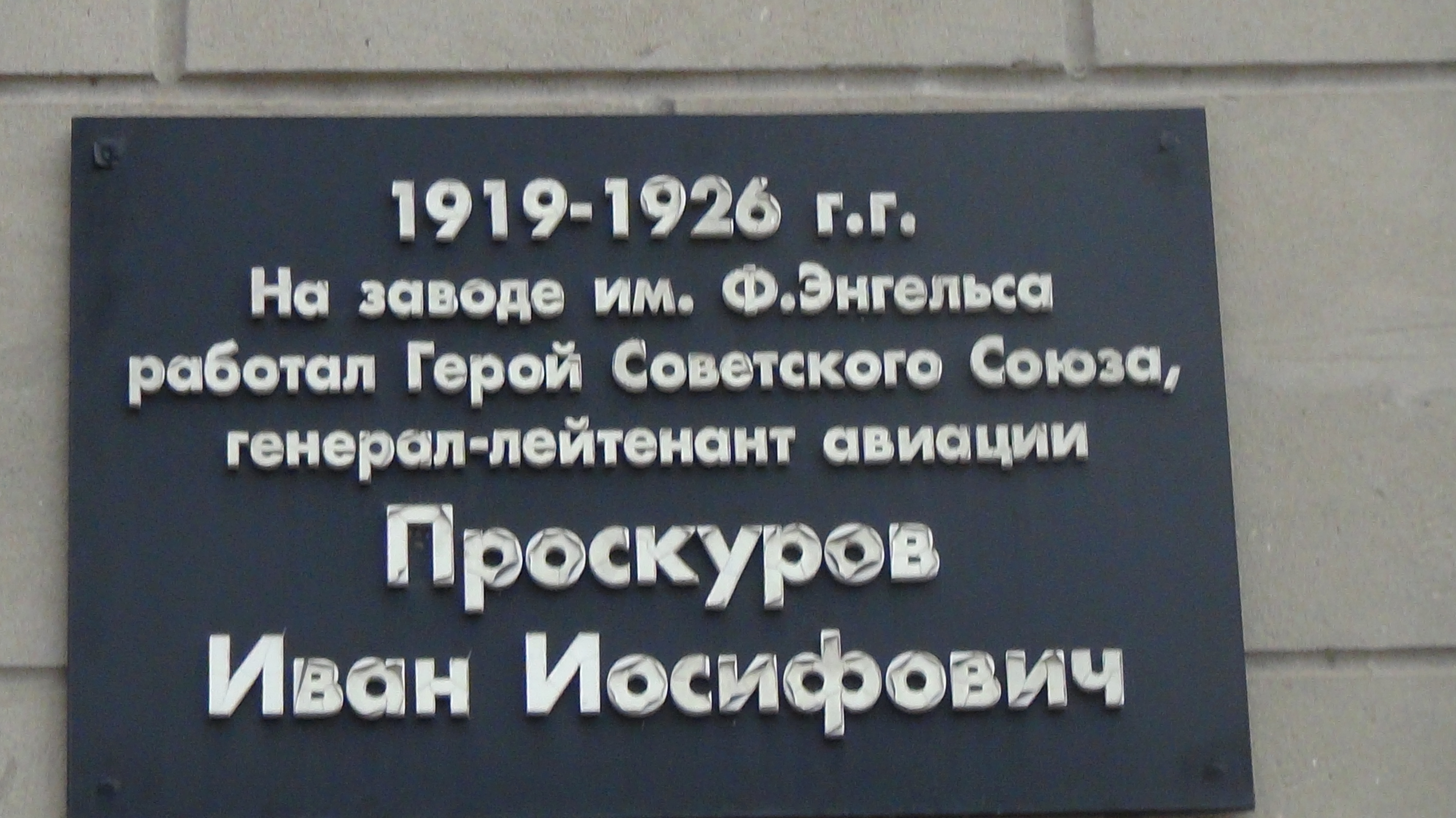 Мемориальная доска в честь Проскурова И.И. - Героя Советского Союза, Запорожье, ул. Гладкого, 2